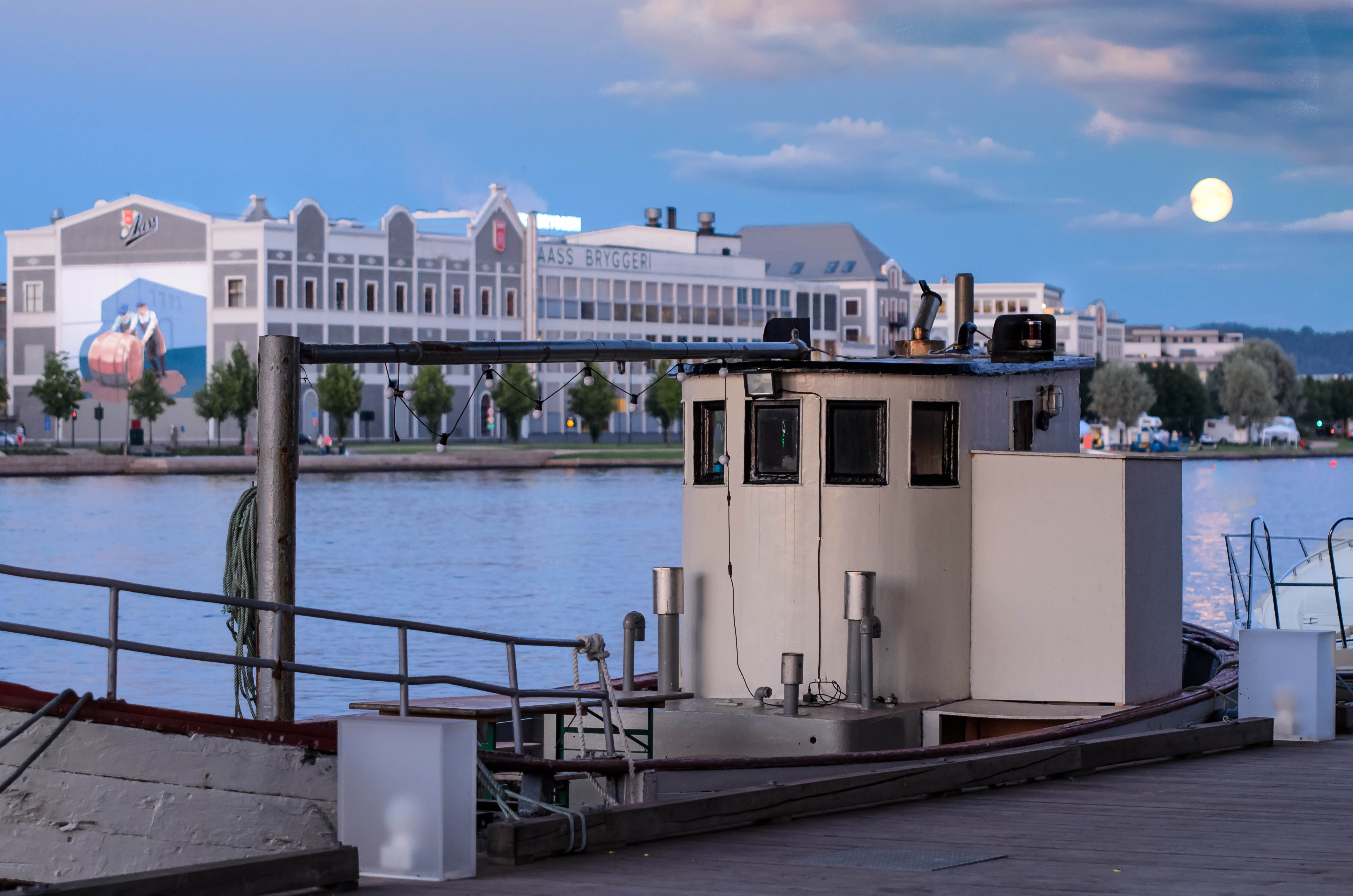 Ass bryggeri sett fra Strømsø